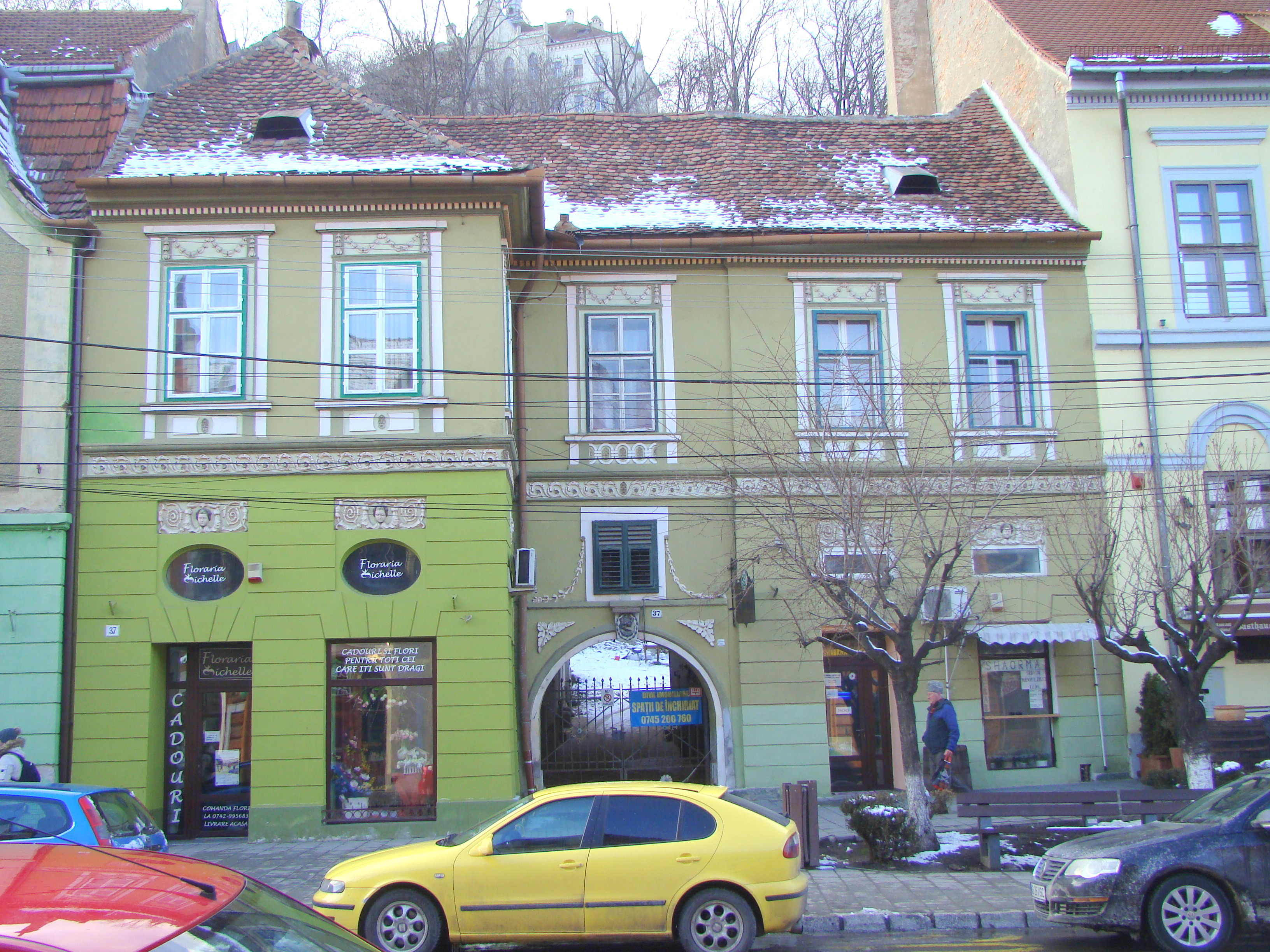 Casa Schuller von Rosenthal, municipiul Sighișoara, Piața Oberth Hermann 37 1694 - 1703, sec. XIX